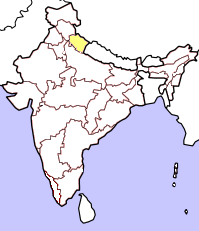 Kartan bygger på resultatet från valet till Lok Sabha april/maj 2004. Gult betyder att partiet lanserat en eller flera kandidater i delstaten, dock utan att vinna mandat. Orange betyder att partiet vunnit mandat från delstaten. Rött betyder att partiet vunnit minst 25% av mandaten från den delstaten och mörkrött 50% eller mer. Kartan tar inte hänsyn till avhopp, partifusioner och fyllnadsval under den ordinarie mandatperiodens gång. Gjord av Soman.